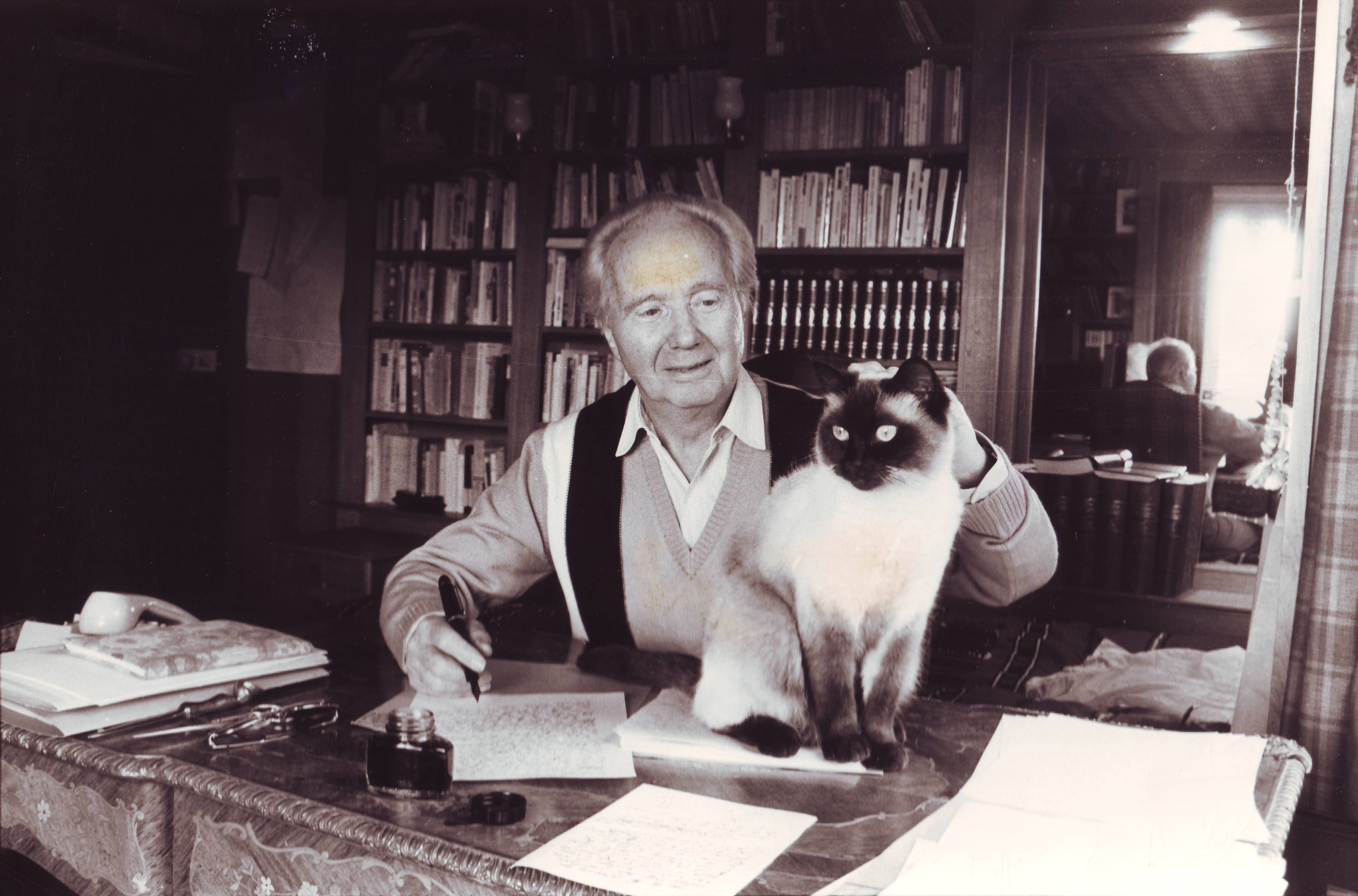 Robert Merle à son bureau